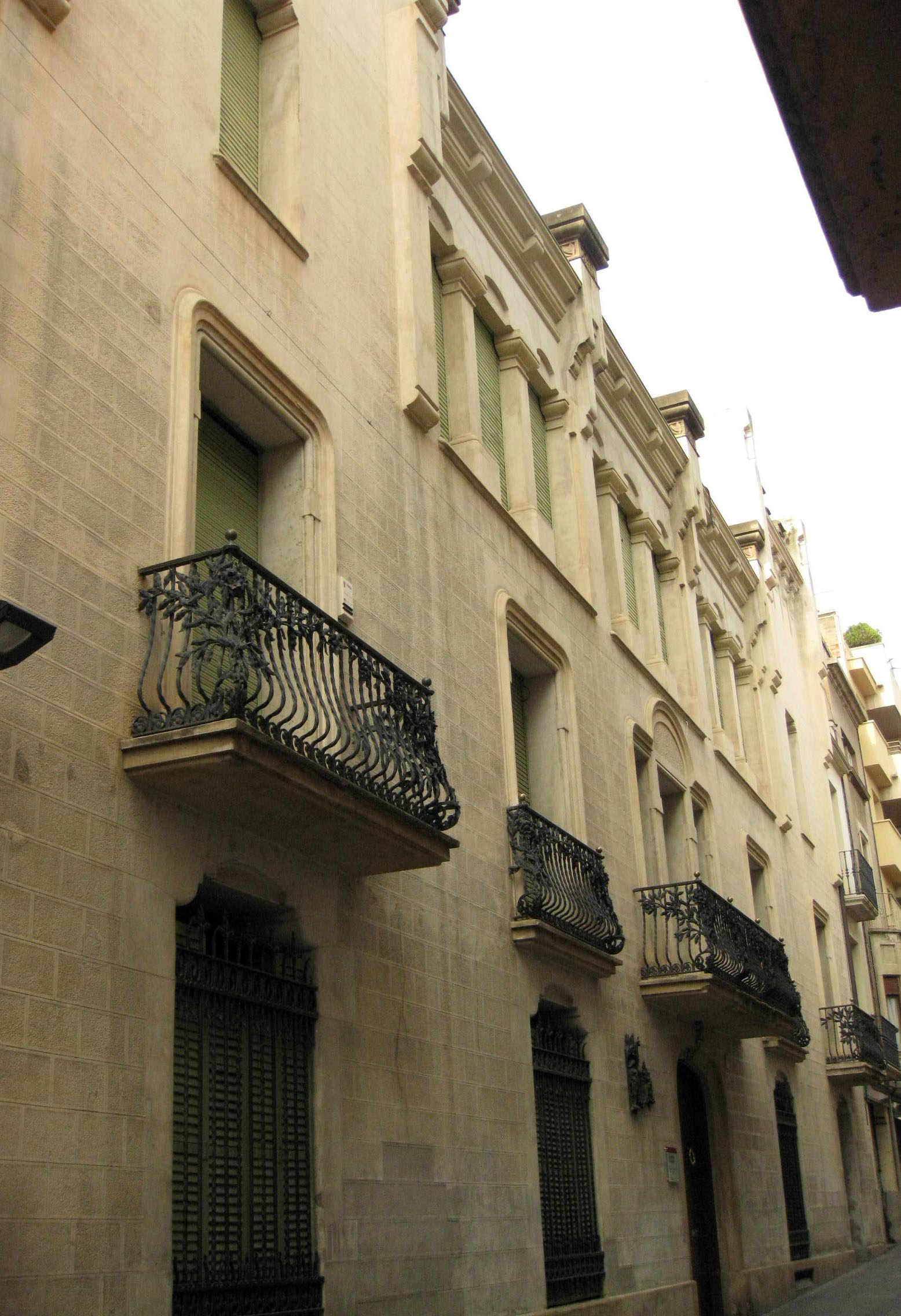 Casa Museu Alegre de Sagrera, façana al carrer de la Font Vella núm. 29-31 (Terrassa)